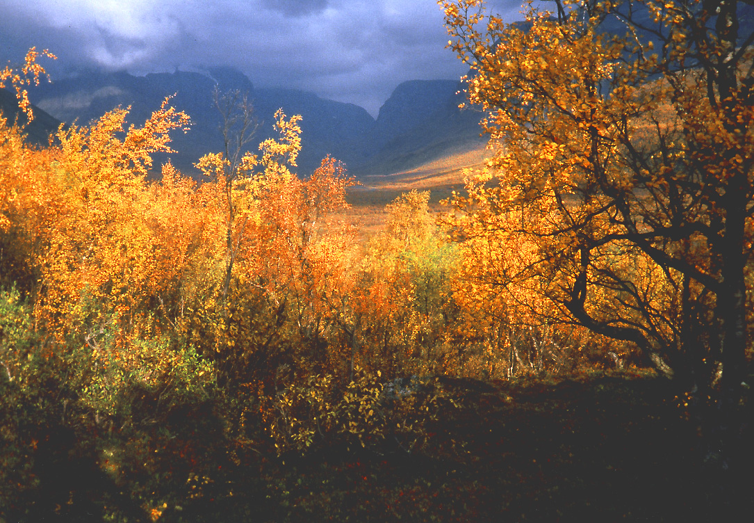 Herbstfärbung des Birkenwaldes in der Nähe von Nikkaluokta